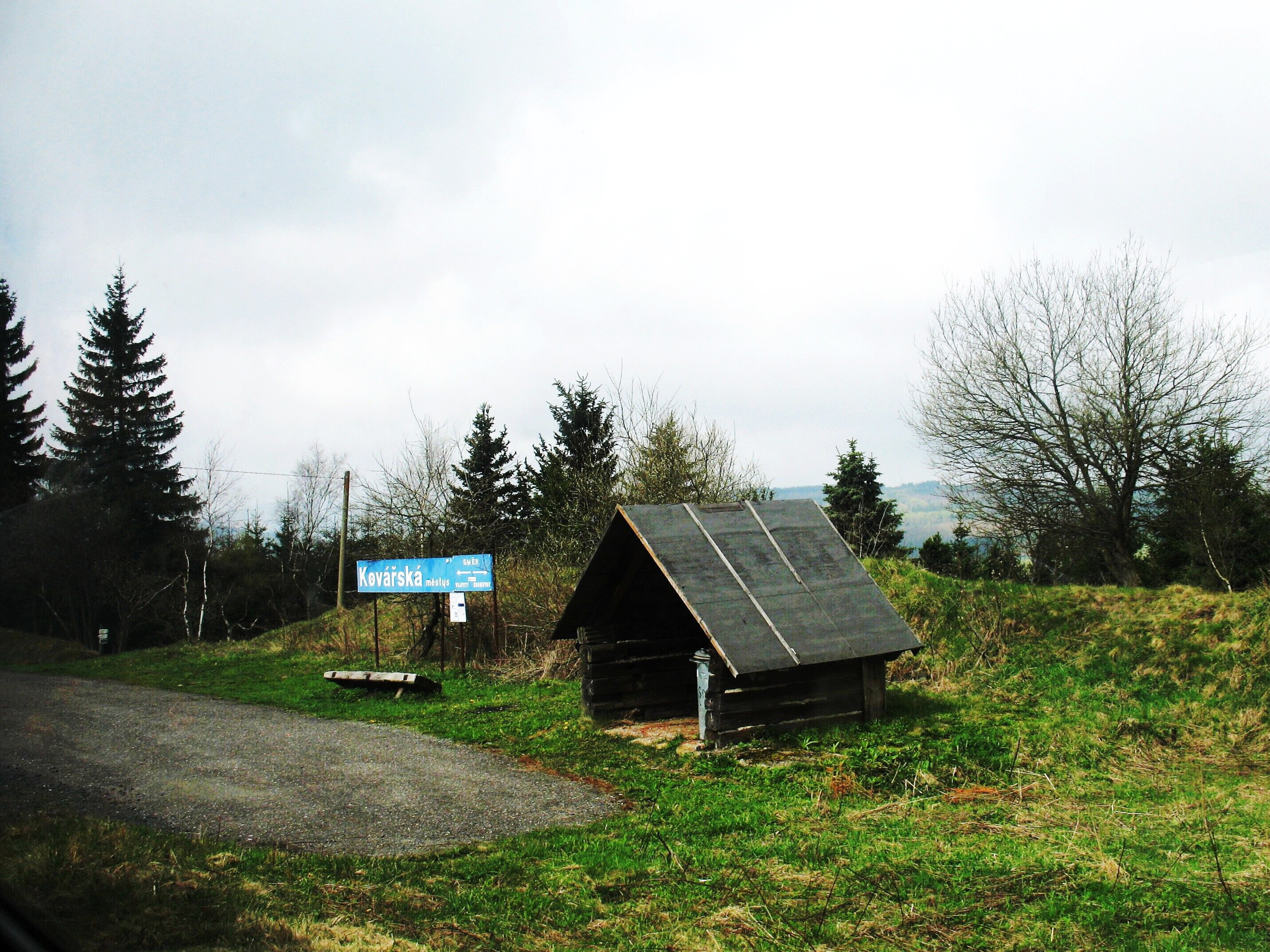 Železniční zastávka "Kovářská městys"